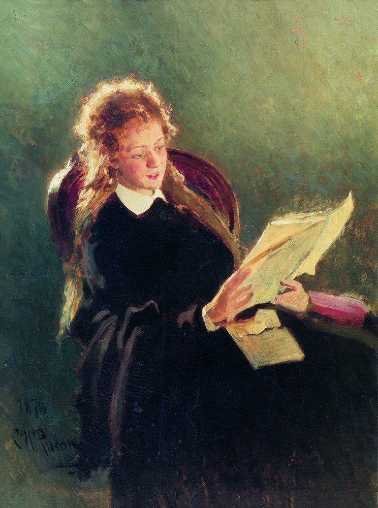 Reading girl